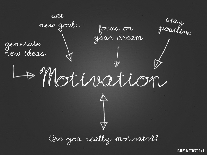 Pizarra con motivación